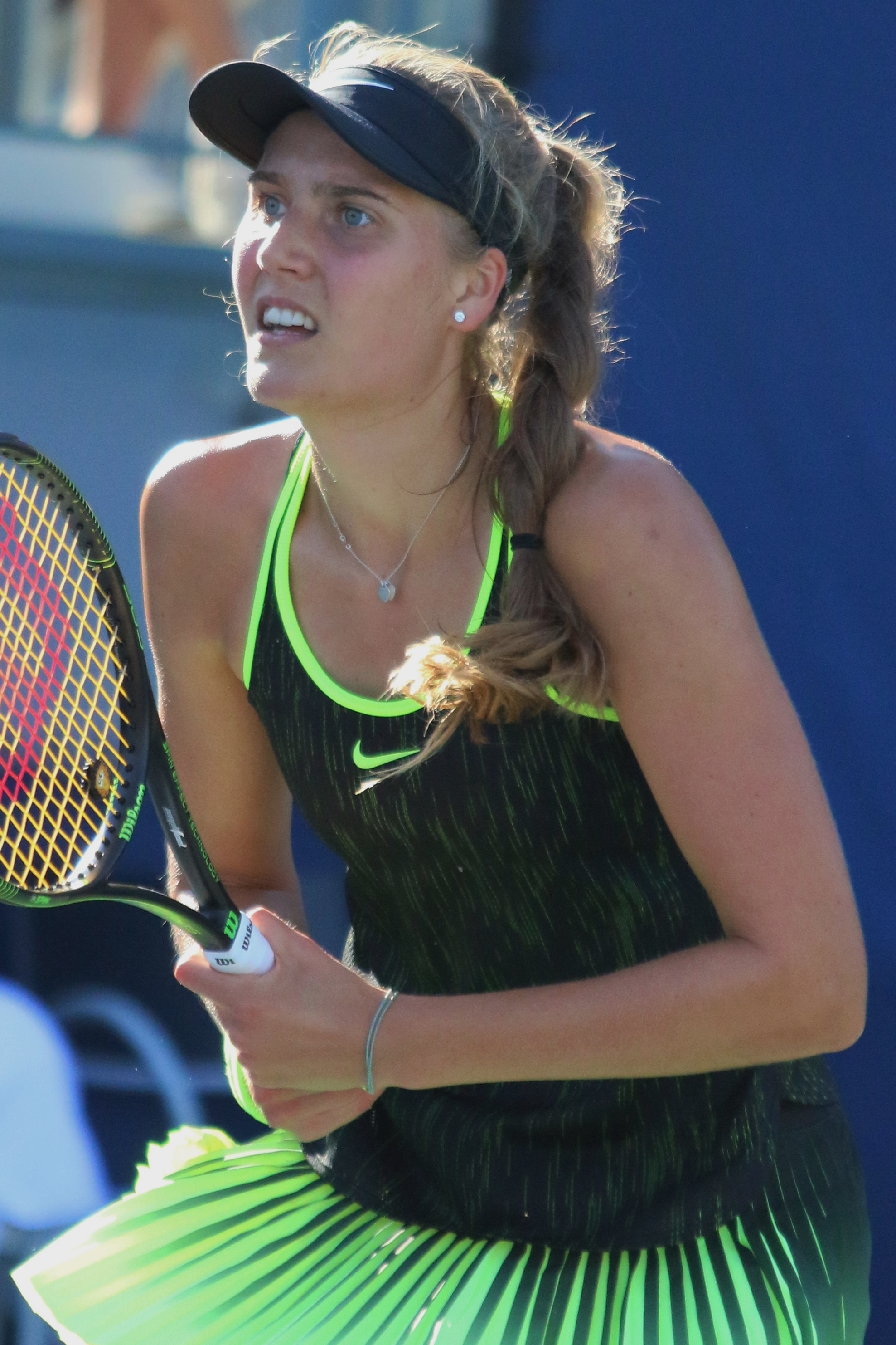 Lottner US16 (7)